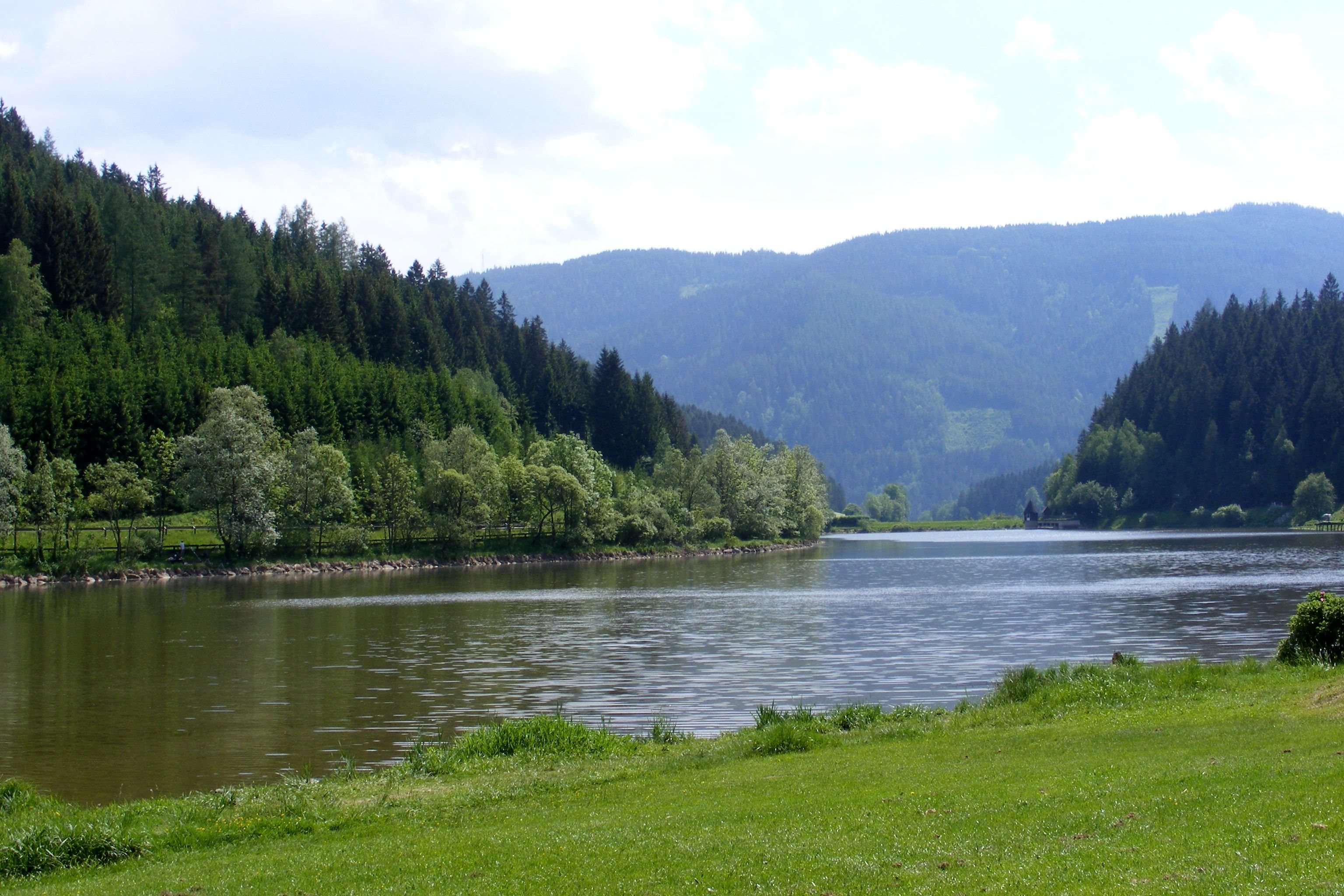 Trabocher See